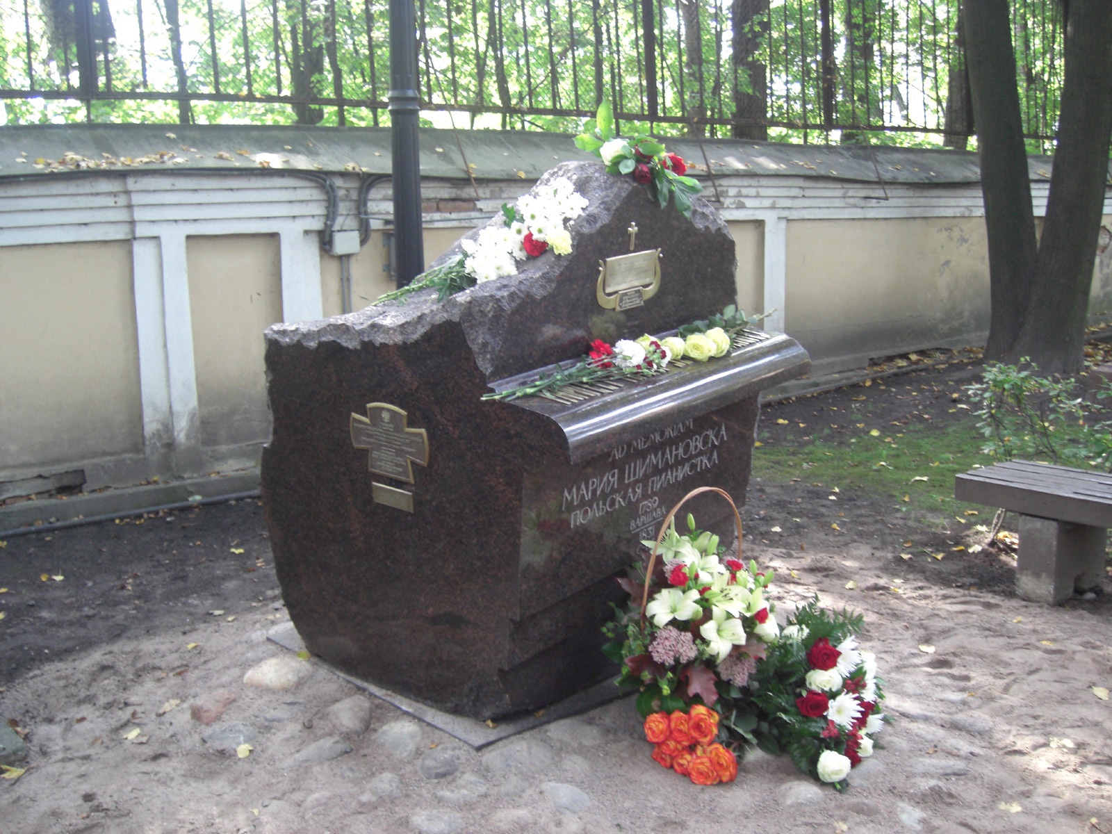 Памятный знак польской пианистки Марии Шимановской на Тихвинском кладбище Александро-Невской Лавры в Санкт-Петербурге